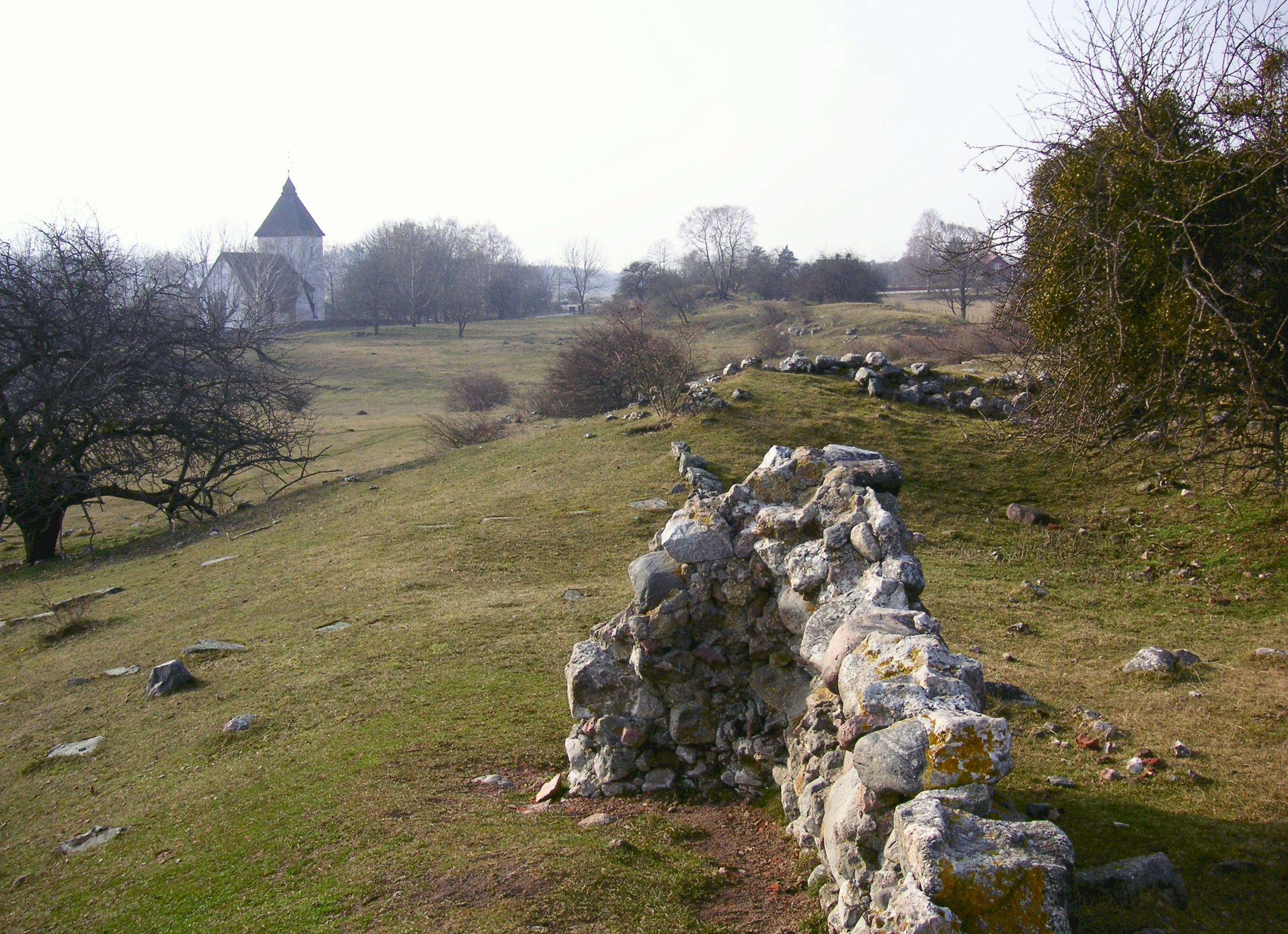 Ruinerna efter Alsnö hus på Adelsön med Adelsö kyrka i bakgrunden.